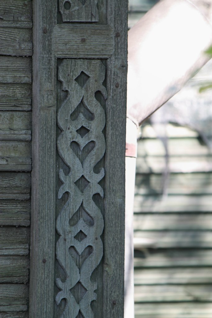 резьба по дереву в оформлении дома в районе Рыбацкого